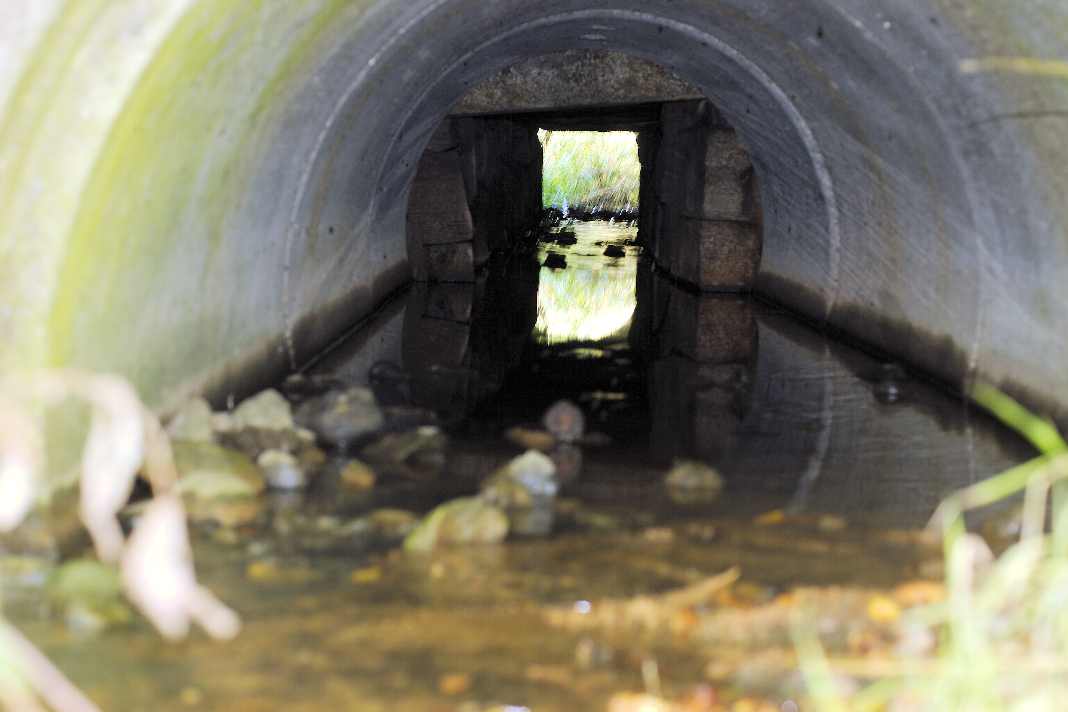 Vejkiste/stenkiste ved Sabro